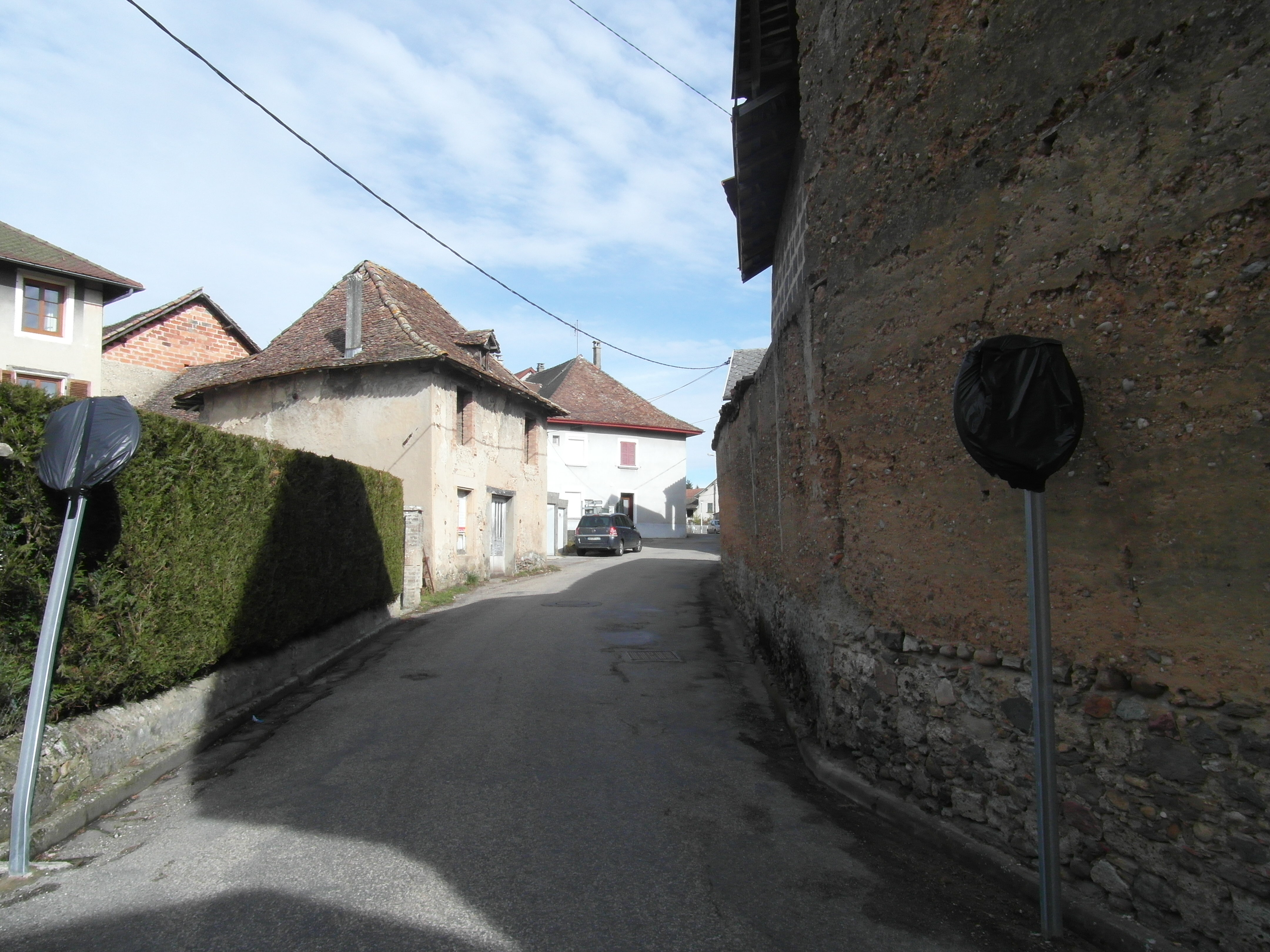 Une rue de Chabons en mars 2019